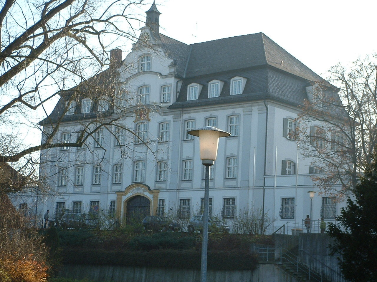 Laupheim, Schloss (Castle) Kleinlaupheim